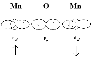 Superaustausch am Bspl. von MnO